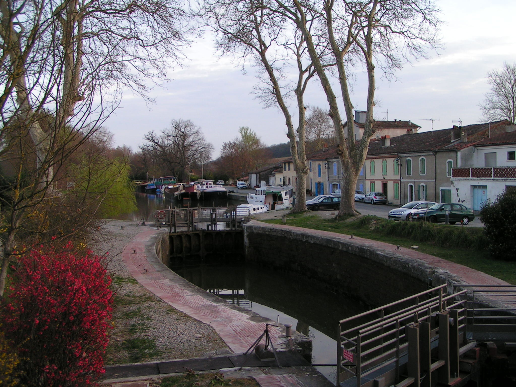 Le port de Gardouch (Haute-Garonne) sur le canal du Midi.